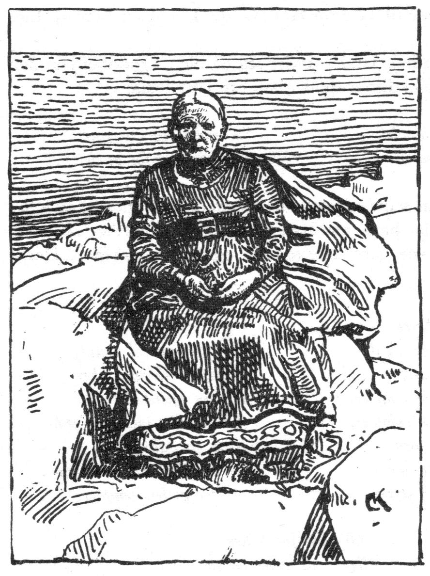 Christian Krohg: Illustration for Olav Tryggvasons saga, Heimskringla 1899-edition. nn: «Gunnhild på Orknøyane etter ho har mist sønene sine.»